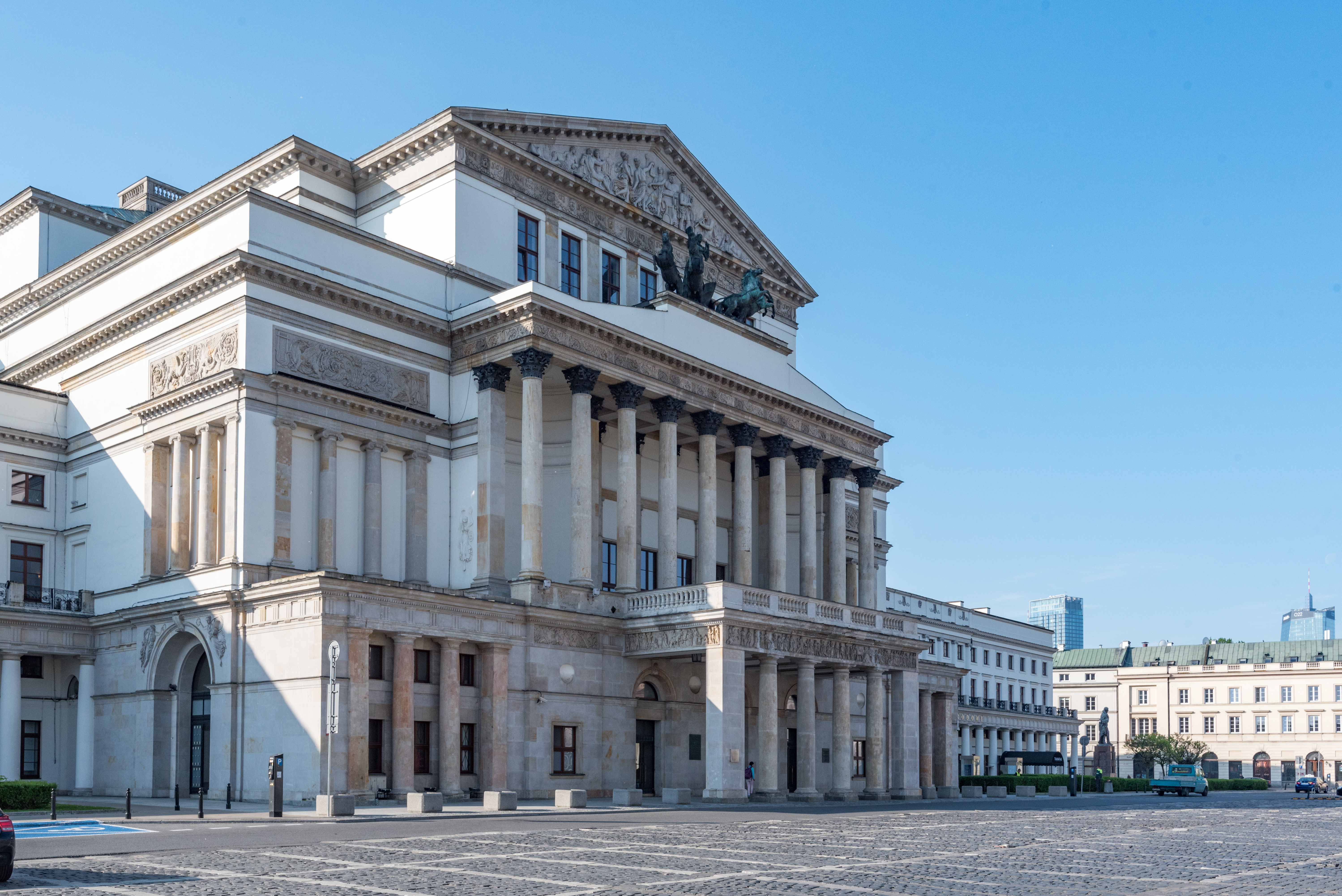 Warszawa, ul. Senatorska 21, 25